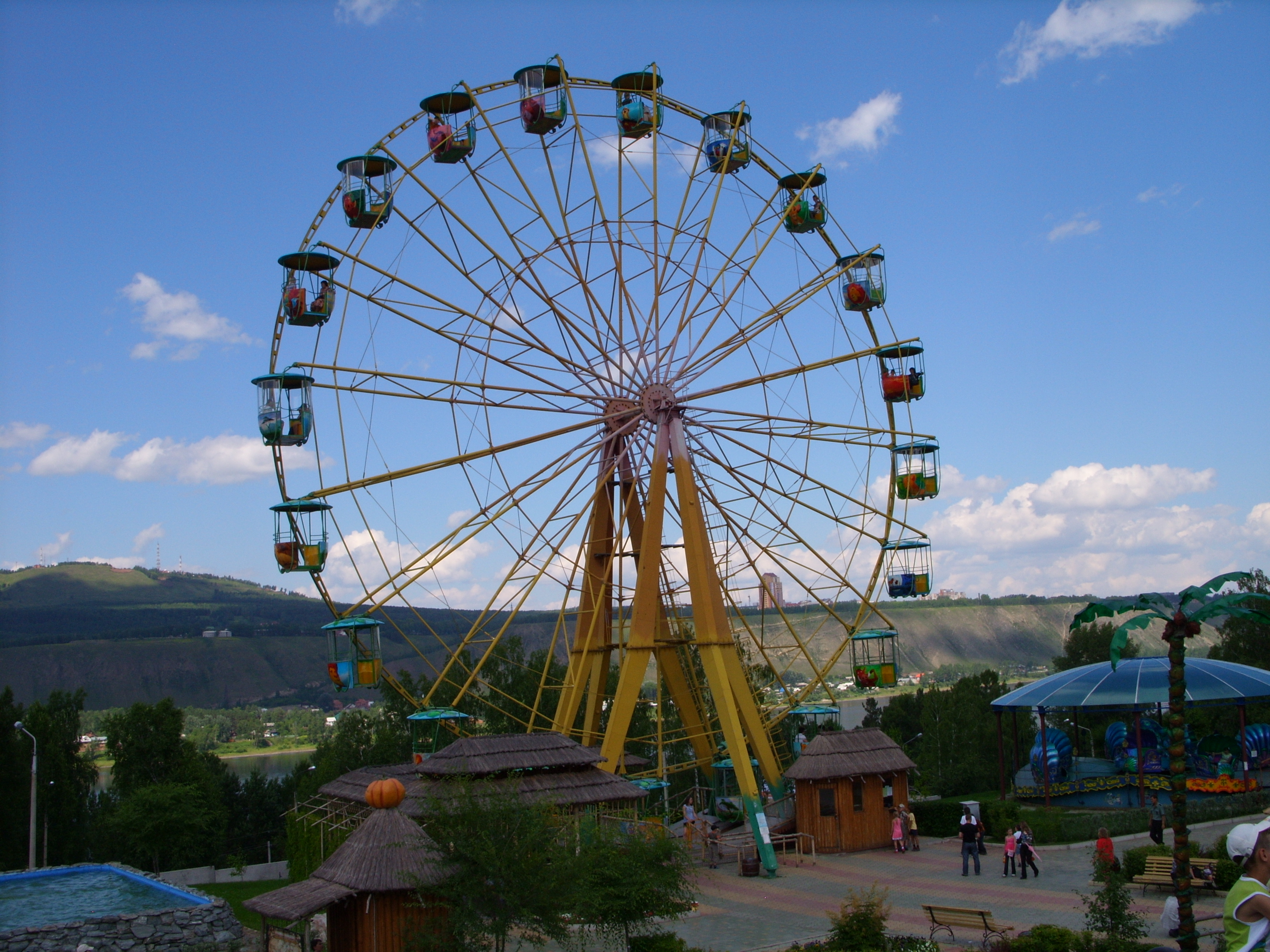 снимки июля 2008 г.